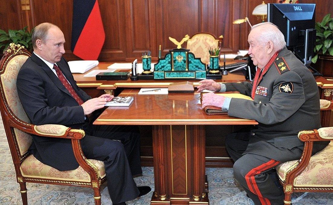 Владимир Путин с генералом армии Махмутом Гареевым